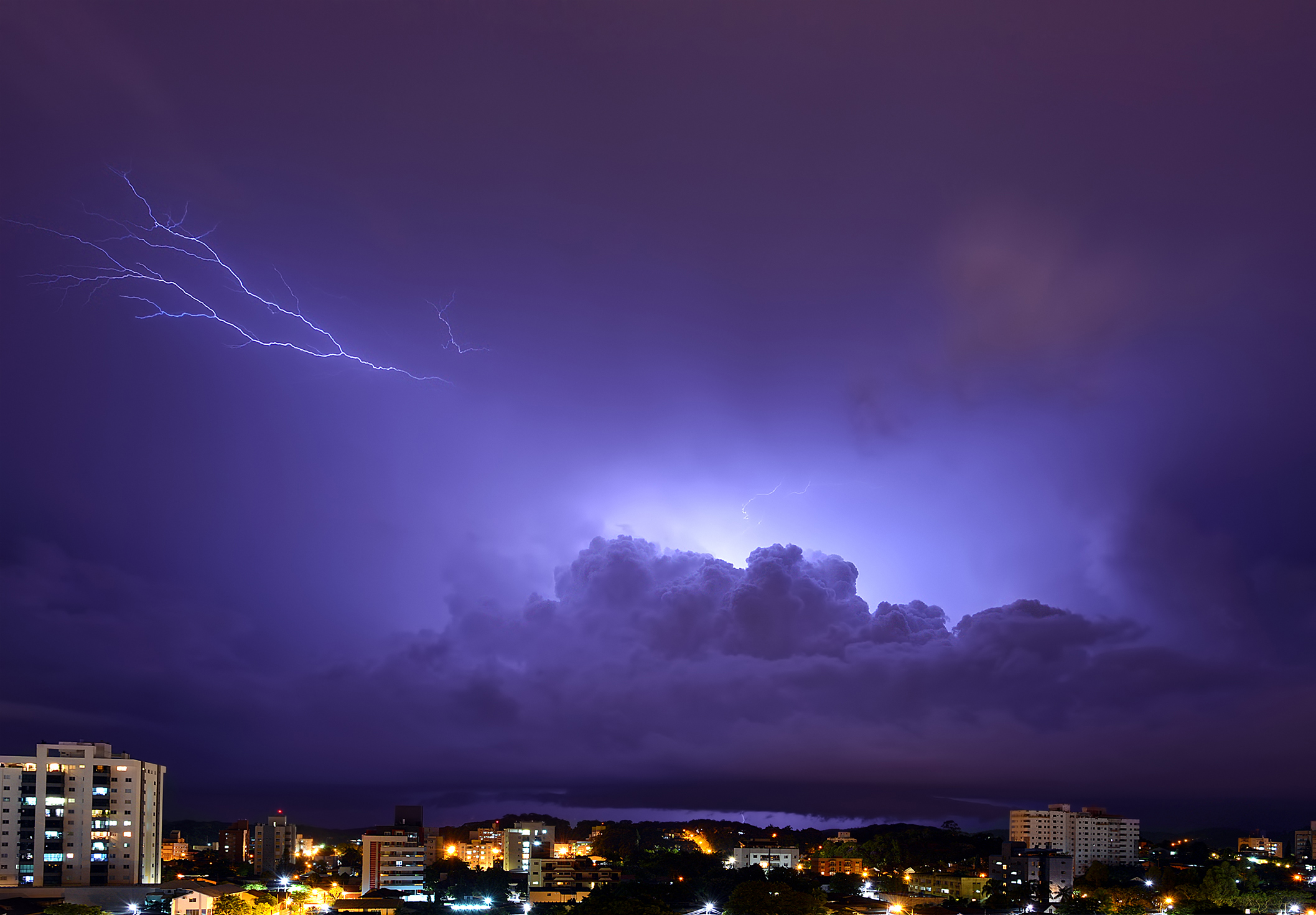 Vista de Joinville, Brasil